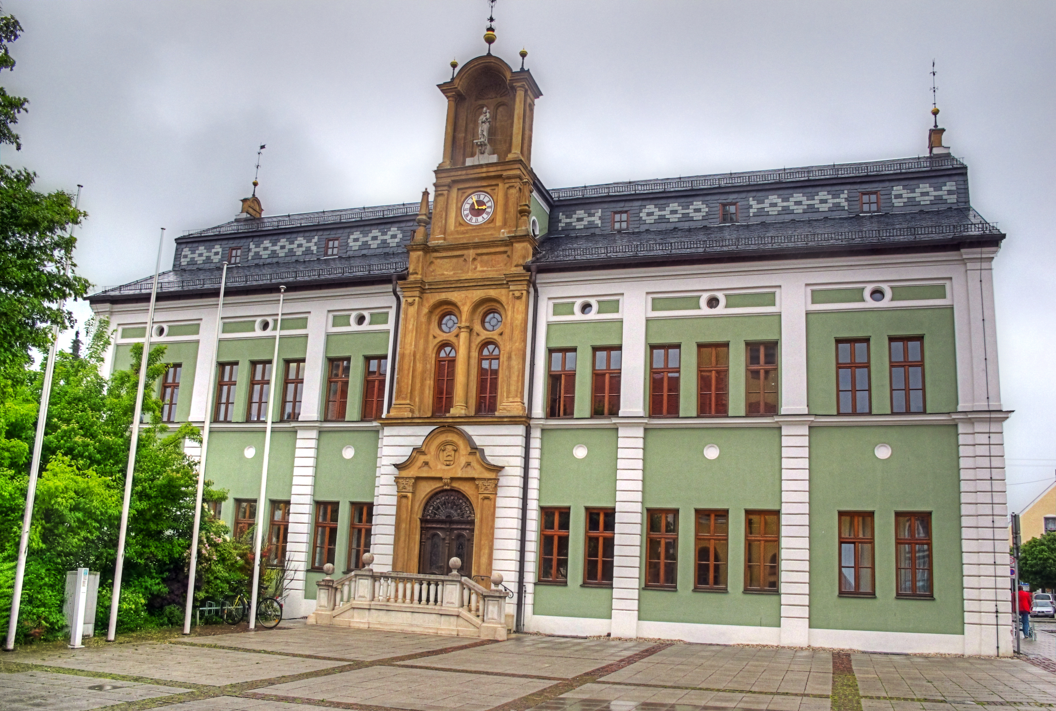 Deutschland, Bayern, Landkreis Pfaffenhofen an der Ilm, Marktgemeinde Wolnzach, Rathaus